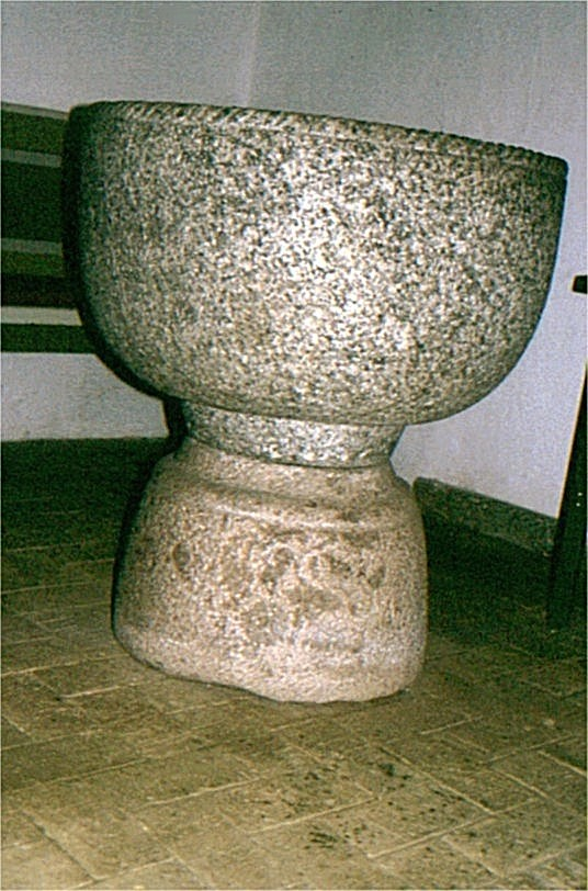 Mammen Kirke, (Viborg Kommune),Døbefont